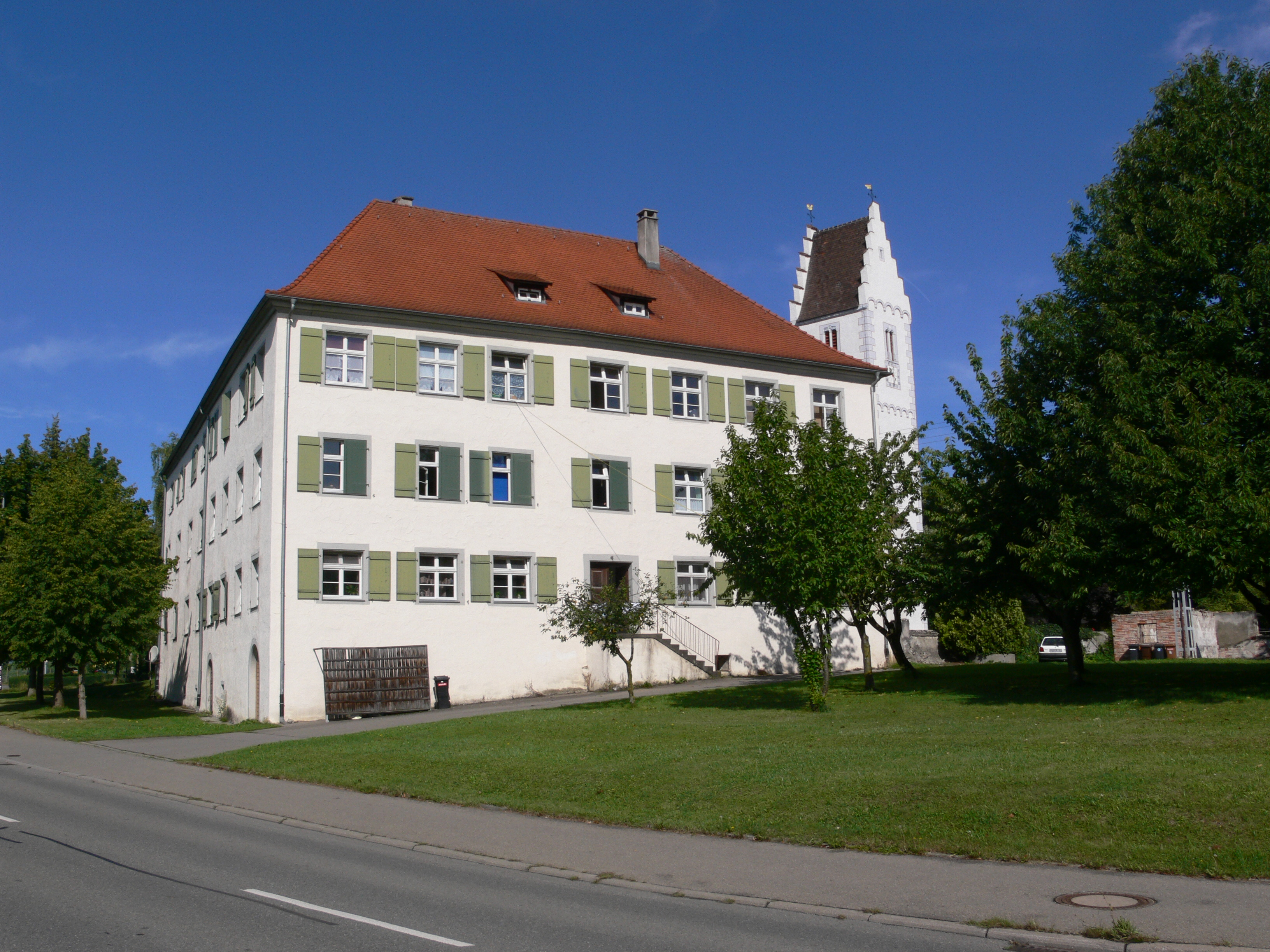 Friedrichshafen, Ortschaft Ettenkirch, Ortsteil Hirschlatt: ehemaliger Kelhof des Klosters Kreuzlingen und Kirche St. Sylvester